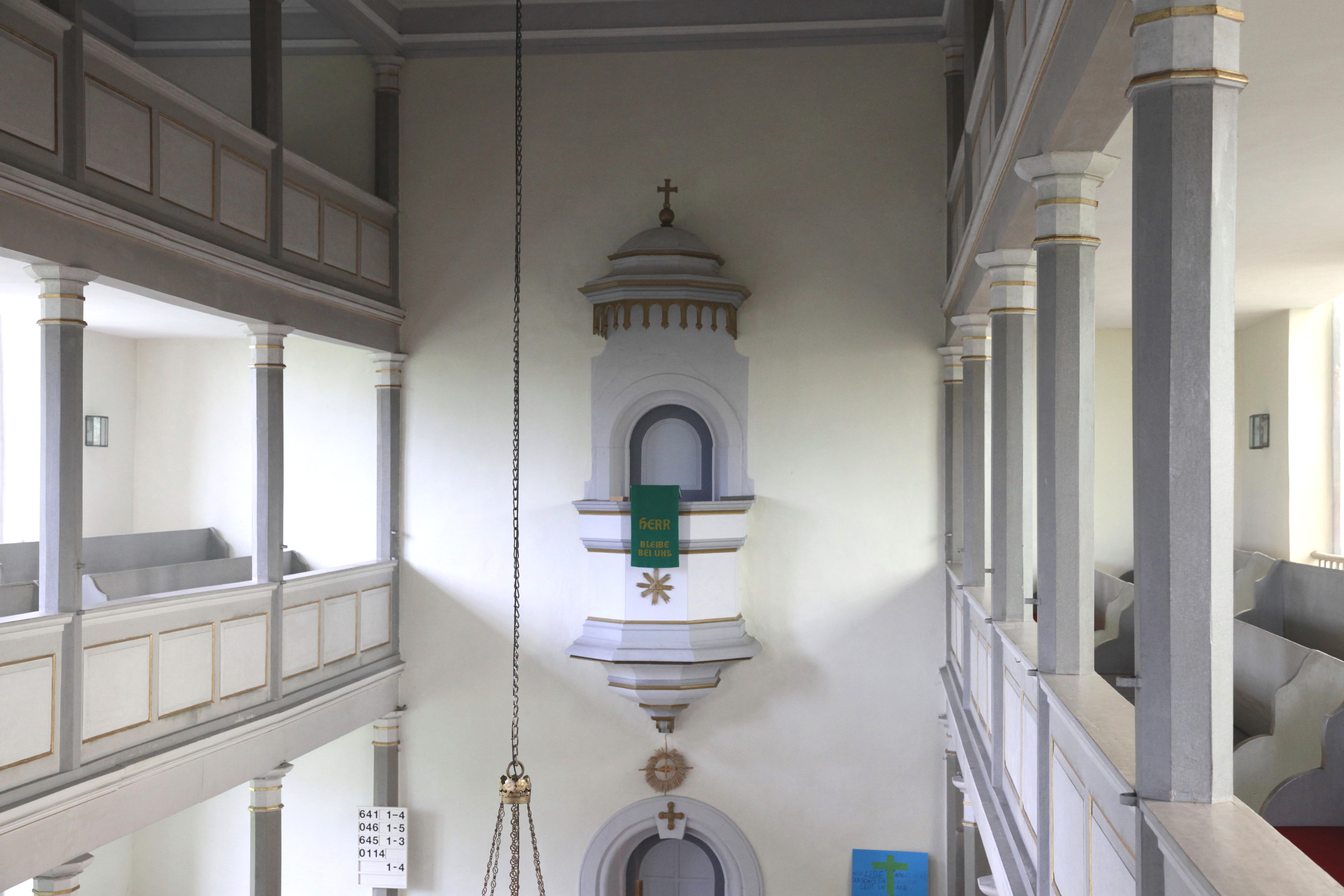 St. Bonifatius in Ahlstadt